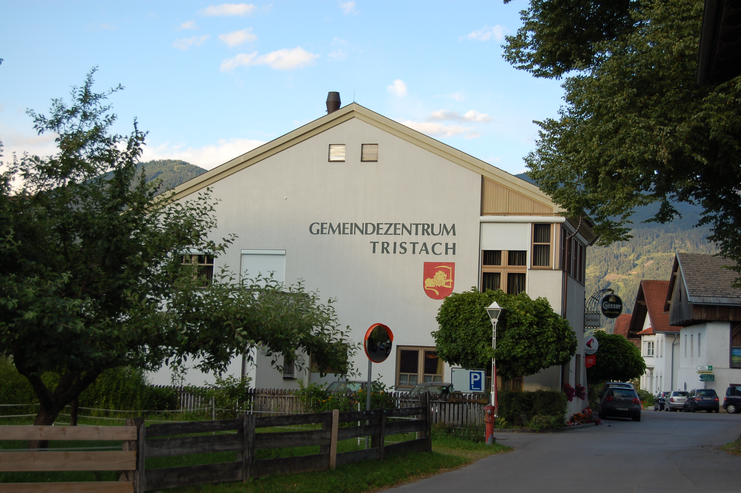 Das Gemeindeamt in der Gemeinde Tristach im Bezirk Lienz (Tirol).